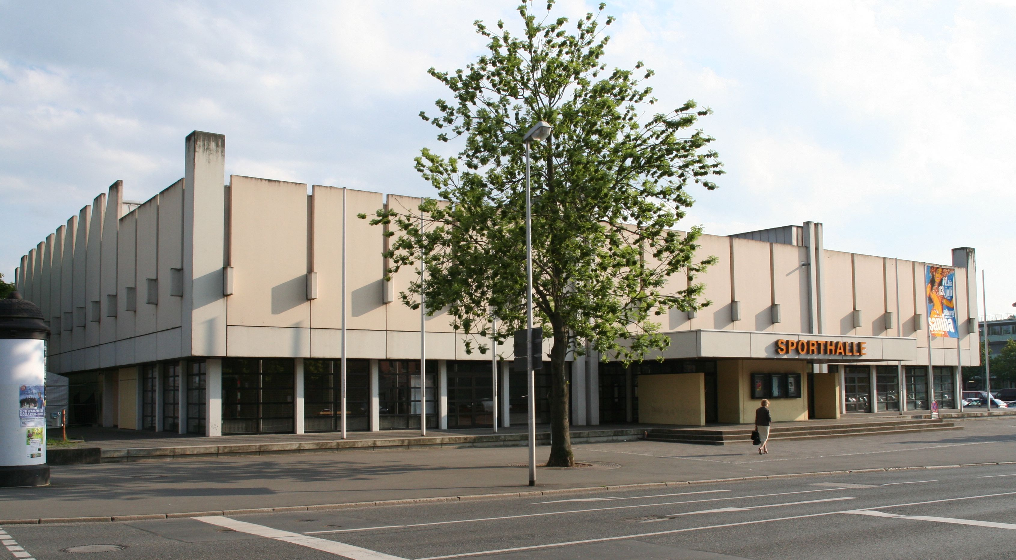 Angersporthalle in Coburg, Schützenstraße 2a, 2019 abgebrochen